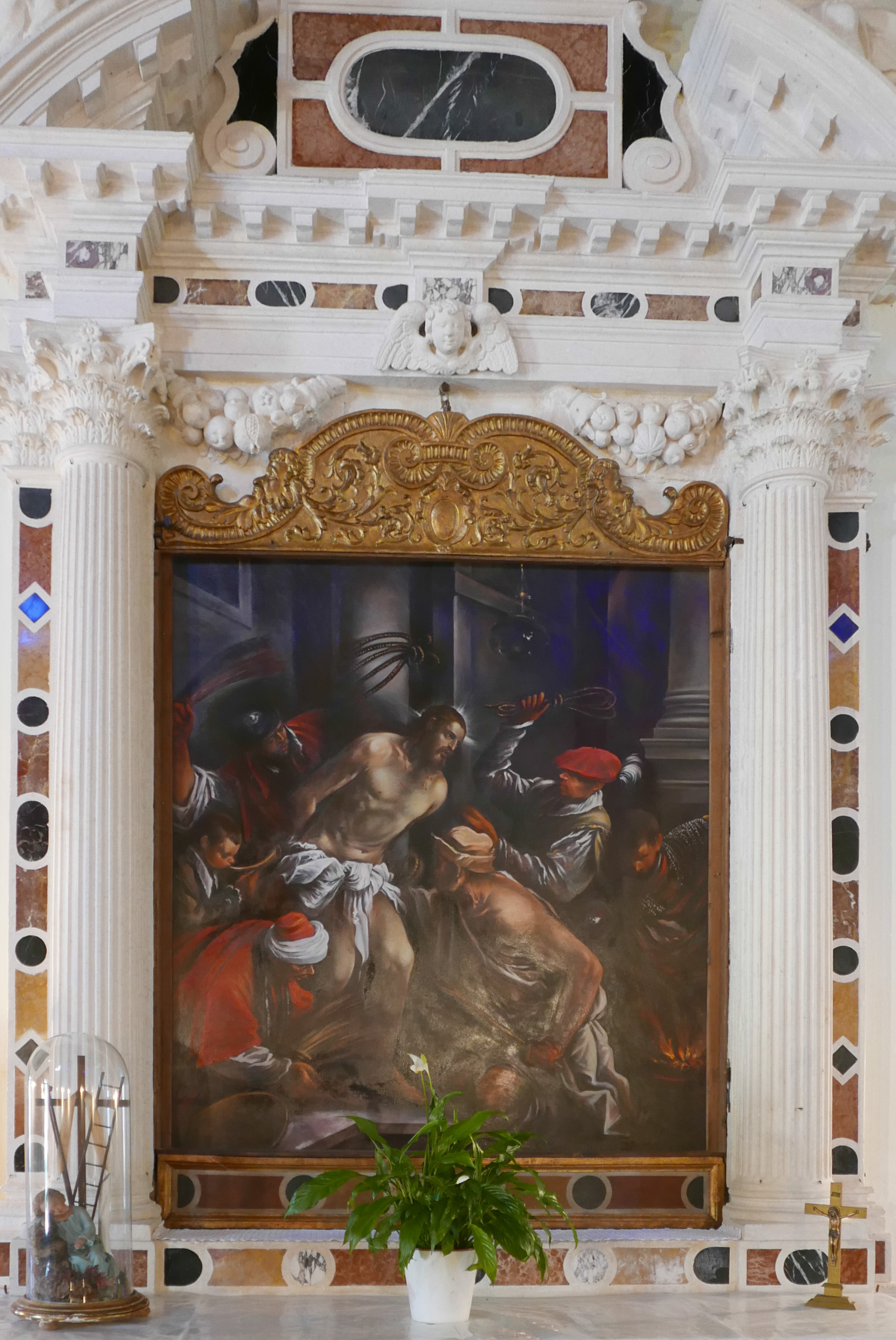 Flagellazione, attribuita alla scuola di Jacopo da Bassano